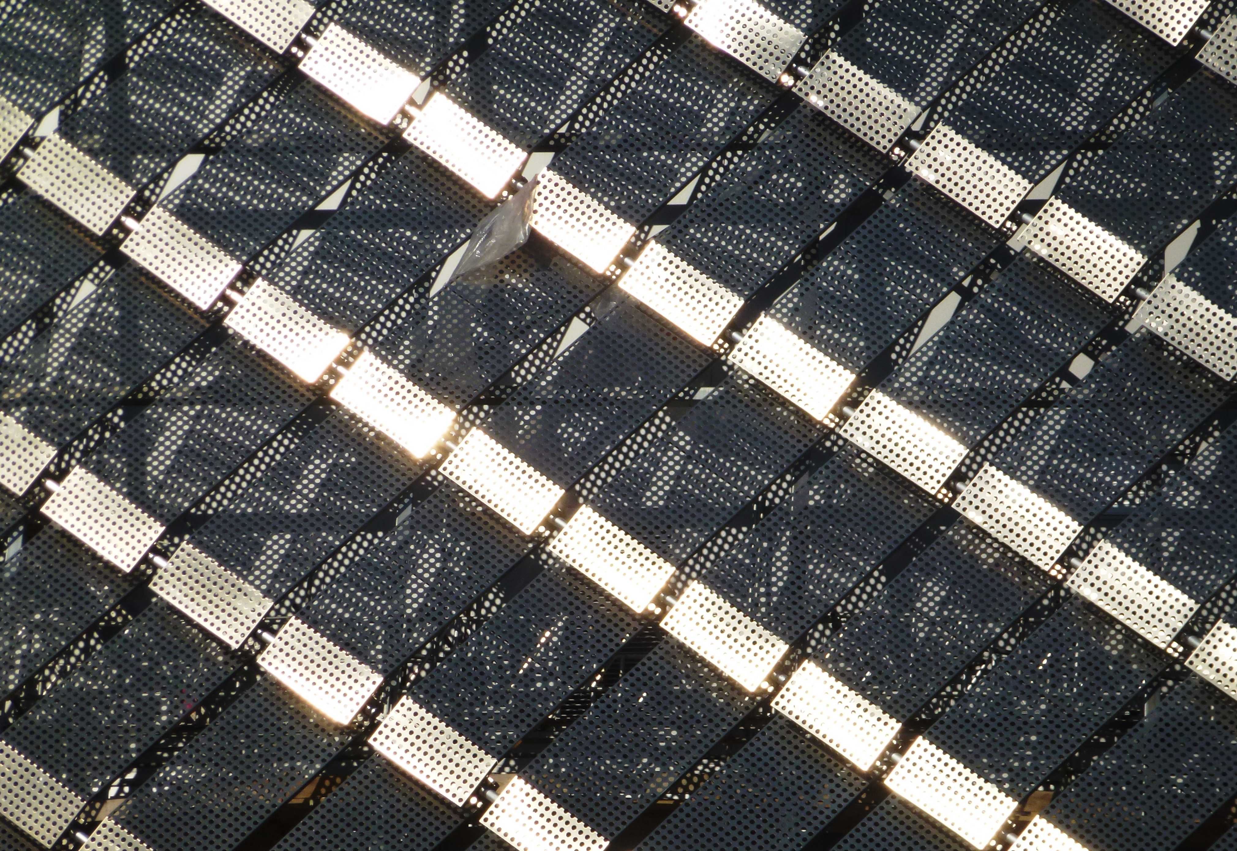 Byggarbeten med Stockholmsarenan - Tele2 Arena i mars 2013